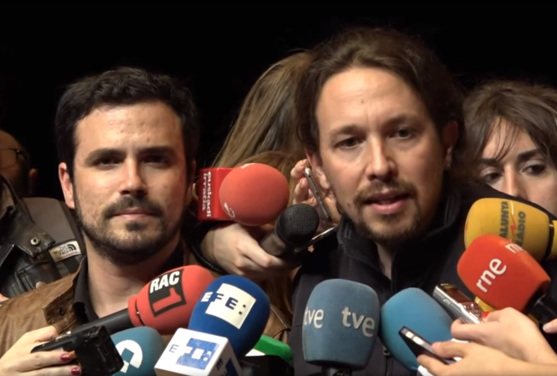 "Sumamos para ganar" con Pablo Iglesias y Alberto Garzón.